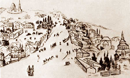 Екатеринослав кистью Ивана Айвазовского